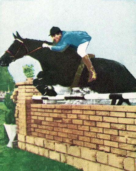 Pierre Jonquères d'Oriola en 1964 (JO) - Campioni dello Sport 1972-1973, n°225.